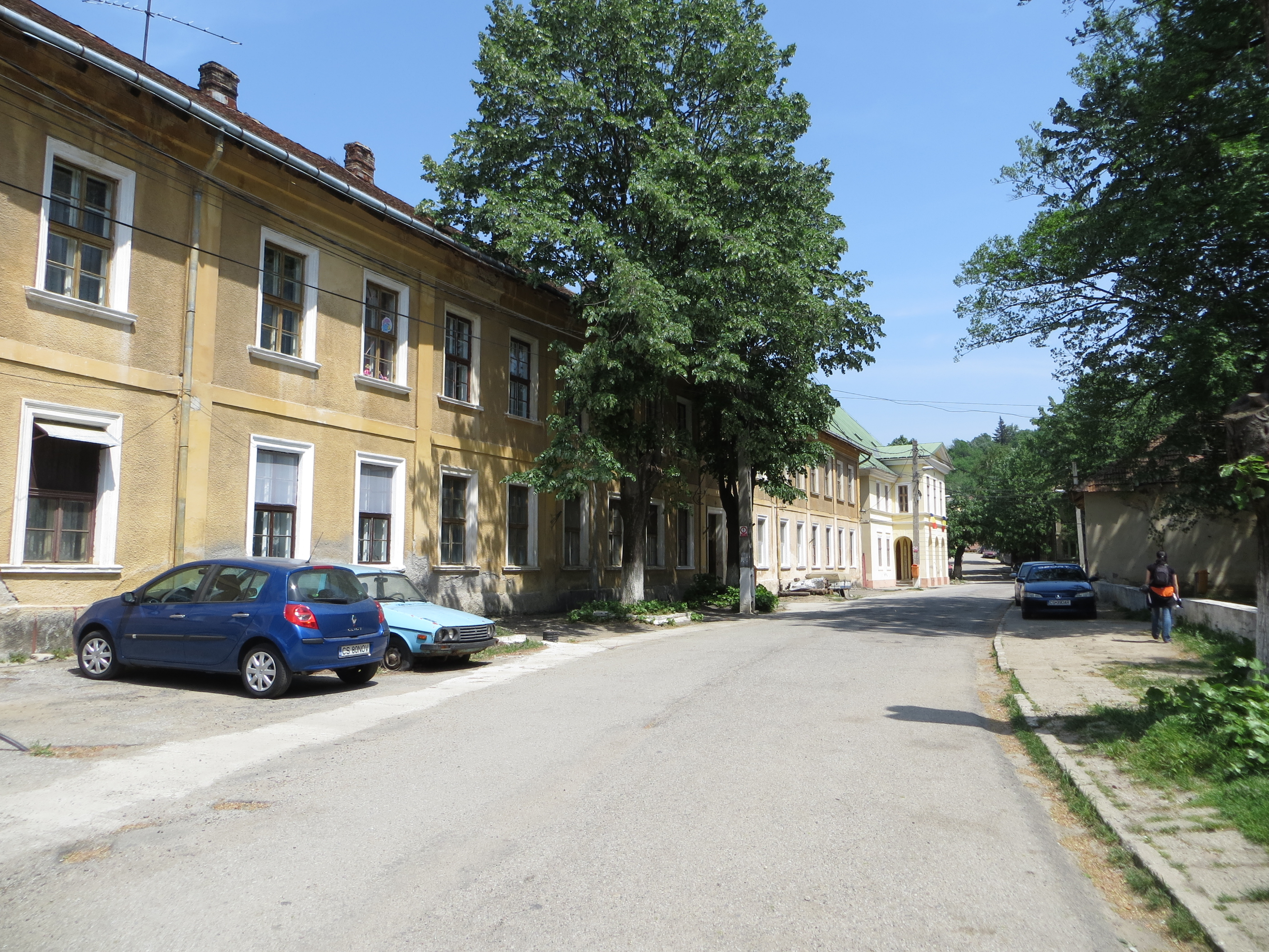 Casă, str. Mihai Eminescu nr. 20, Oravița